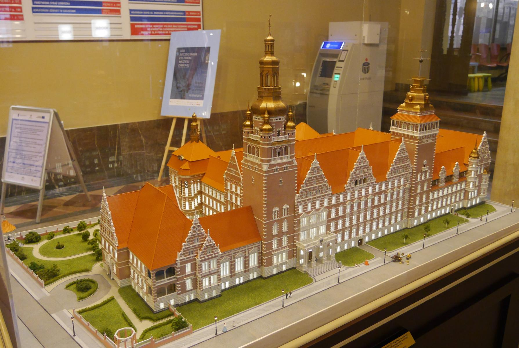 Modell des Ehemaligen Regierungsgebäudes des Regierungsbezirkes in Stettin. Heute Woiwodschaftsverwaltung von Westpommern. Dieses Modell befindet sich im Foyer des Gebäudes.